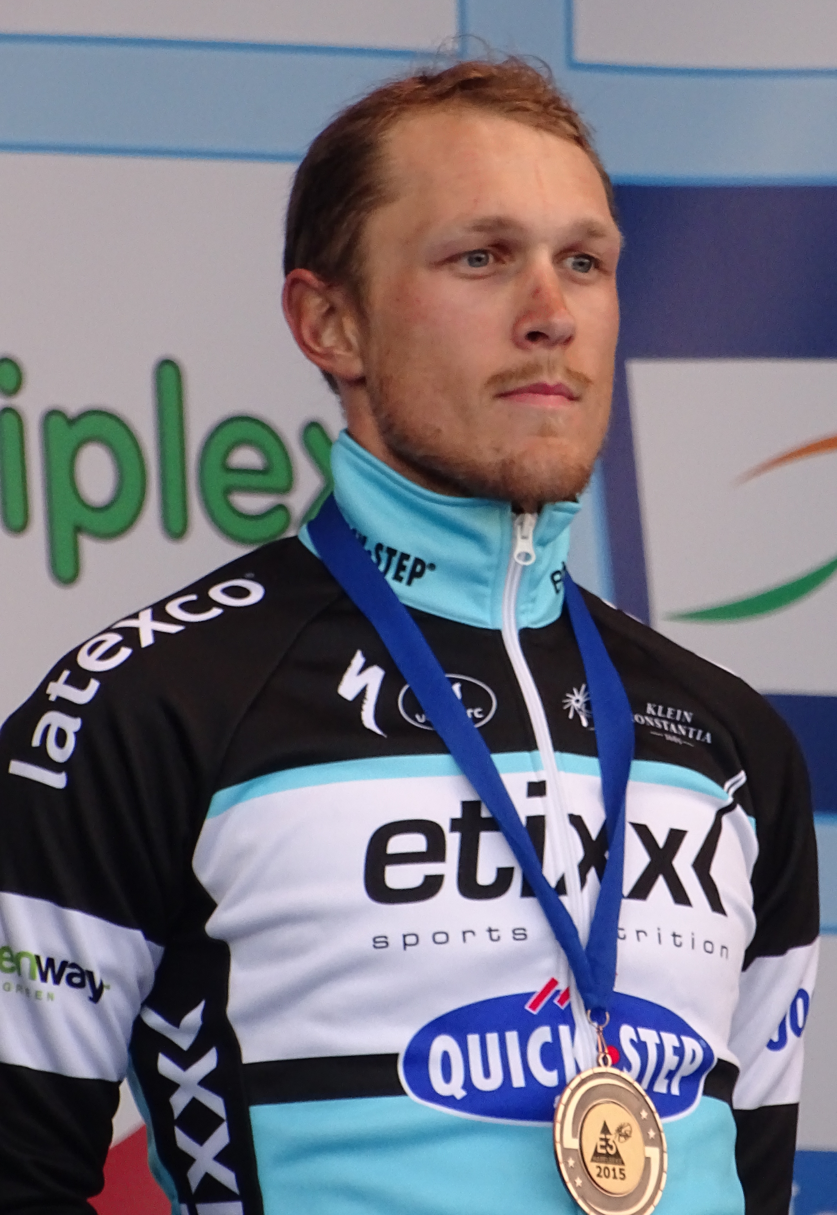 Reportage réalisé le vendredi 27 mars à l'occasion du départ et de l'arrivée du Grand Prix E3 2015 à Harelbeke, Belgique.